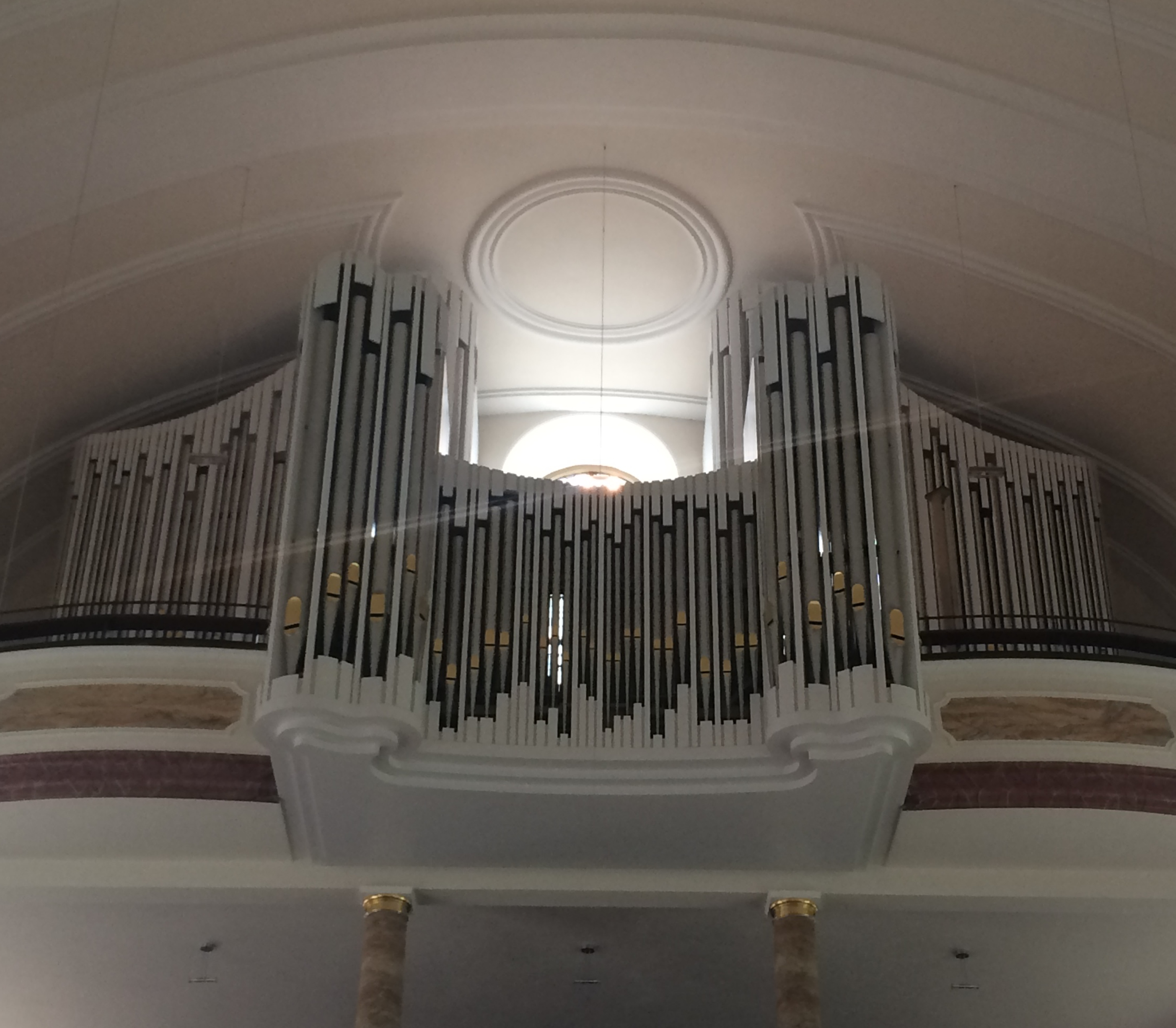 Prospekt der Klais Orgel in St. Dionysius Neckarsulm